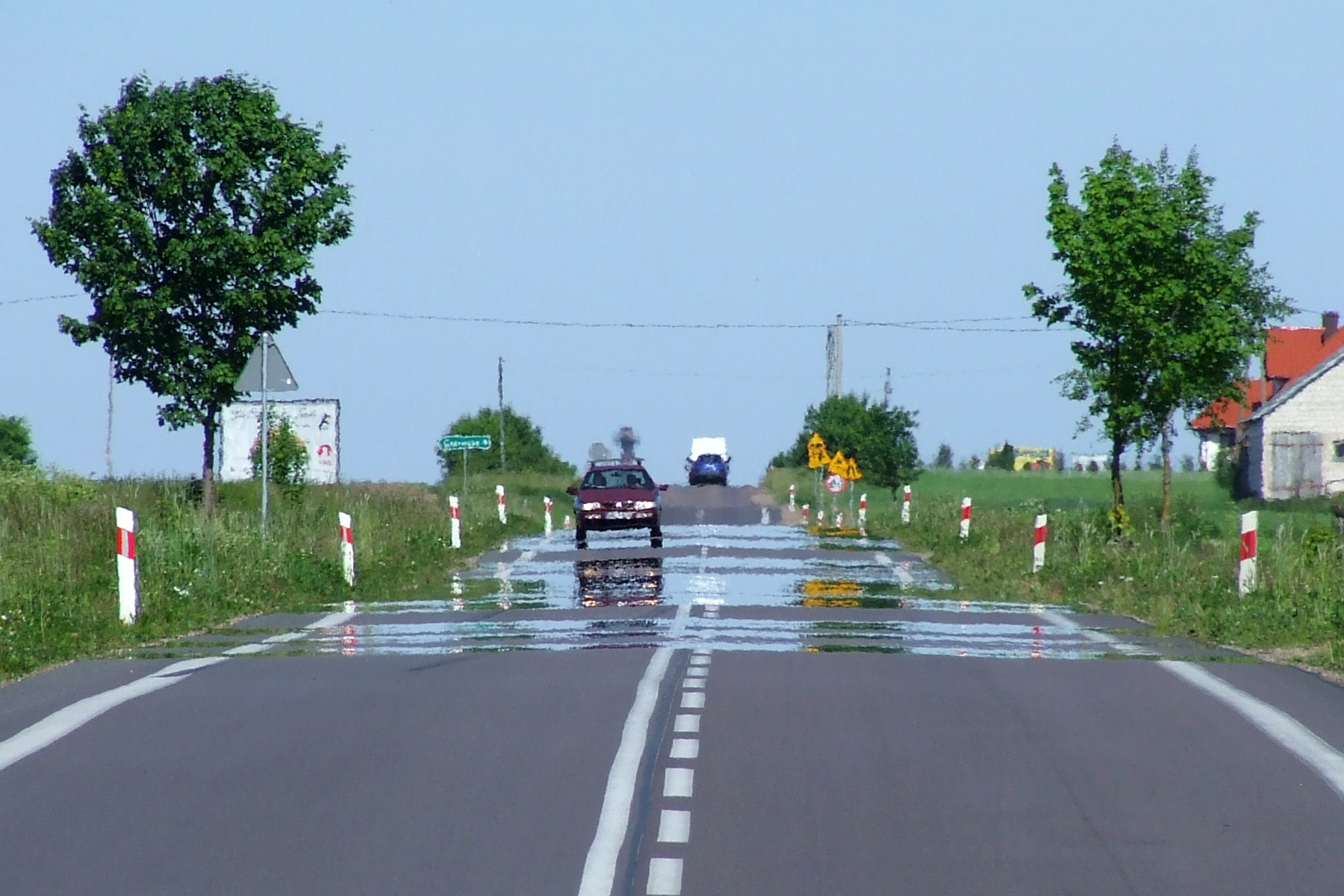 Miraż widoczny na nagrzanej powierzchni drogi asfaltowej. Temperatura powietrza 19 stopni Celsjusza. Długość ogniskowej obiektywu (ekwiwalent dla małego obrazka) 380mm.